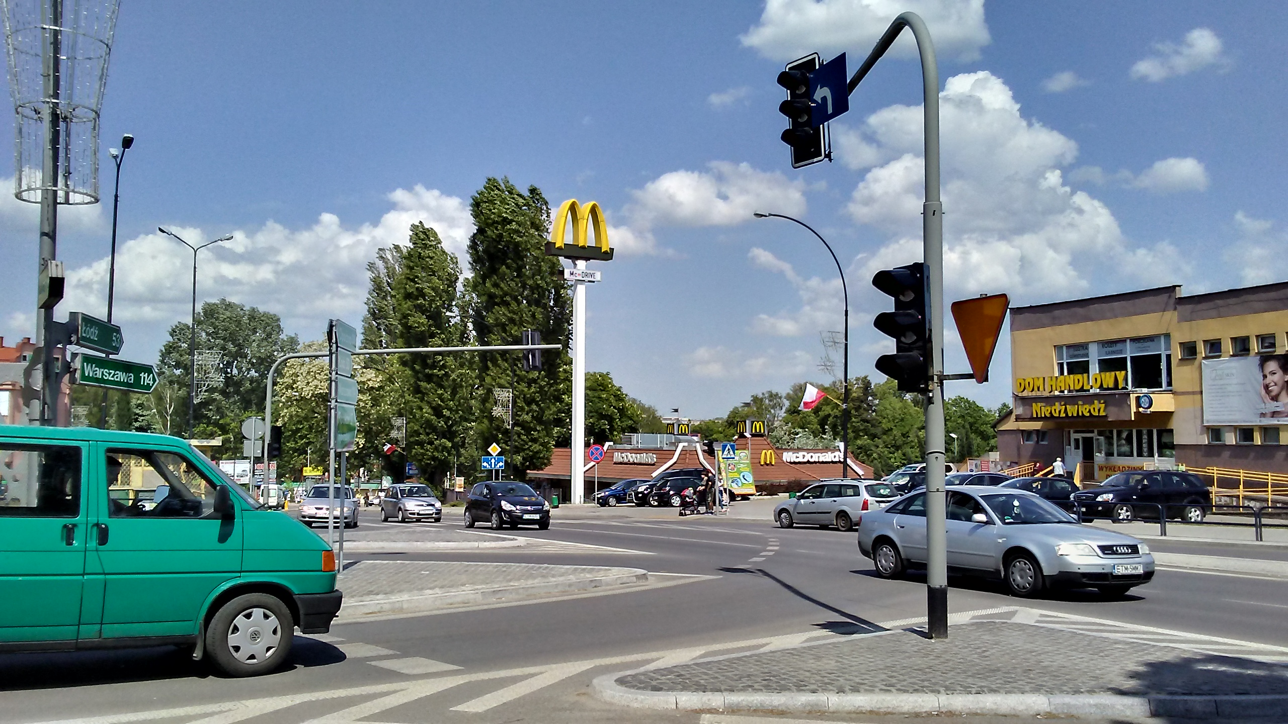 Restauracja McDonalds przy DH Niedźwiedź